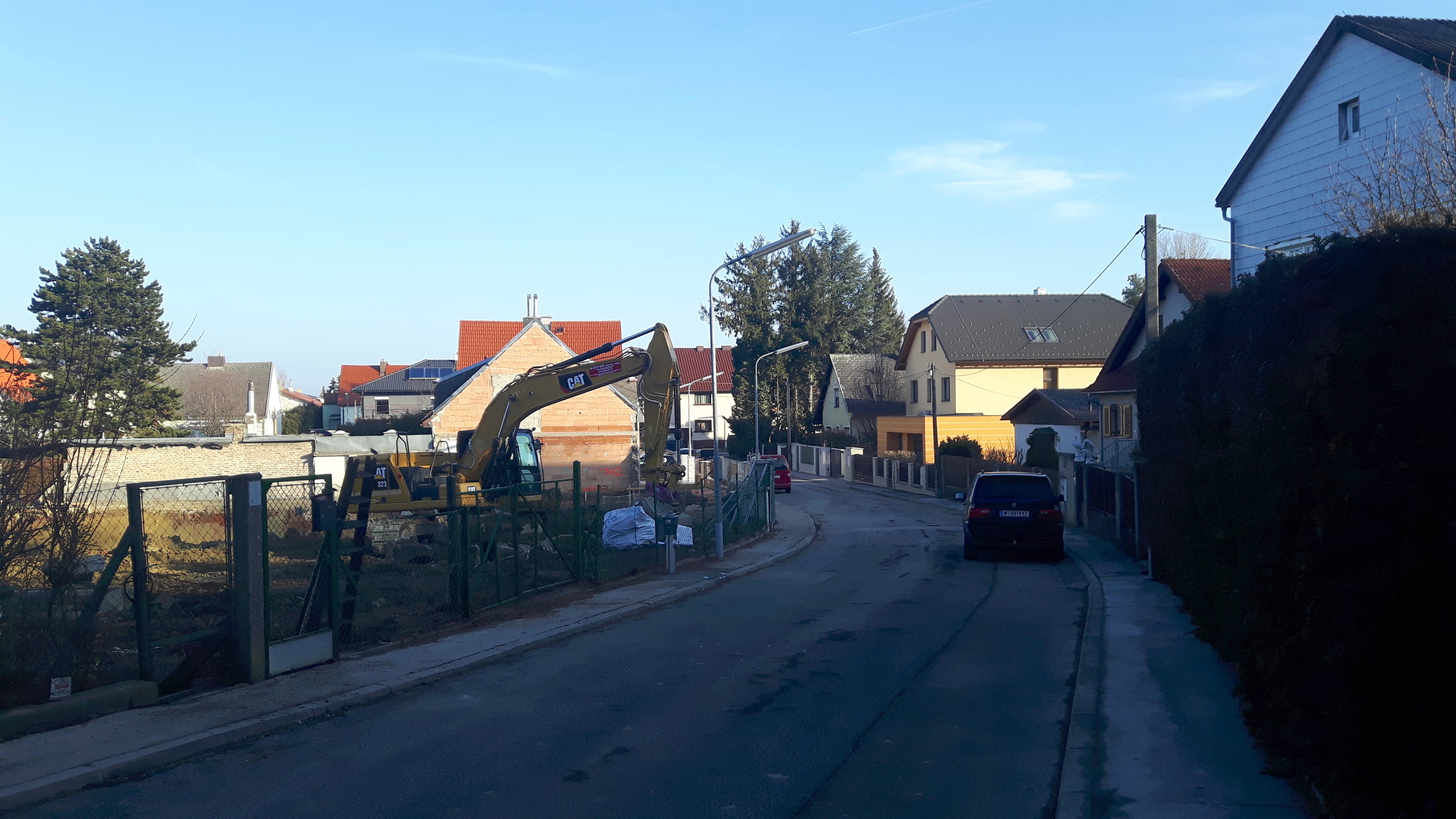 Varronegasse in Wien-Siebenhirten.